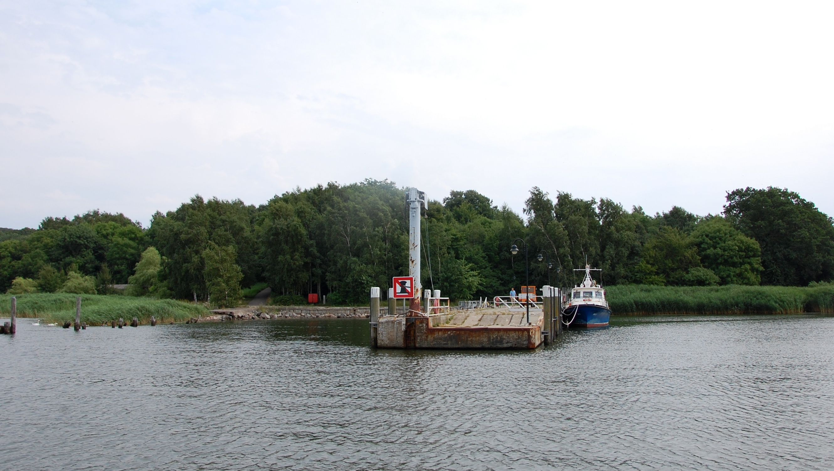 Vilm Anleger Blick vom Wasser